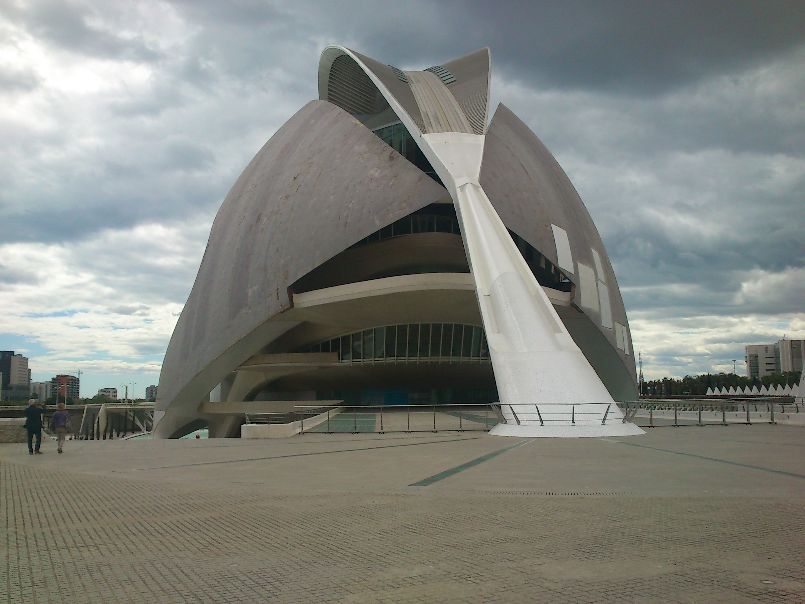 Palau de les Arts Reina Sofia nach der Entfernung der ursprünglichen Keramikverkleidung (2014).